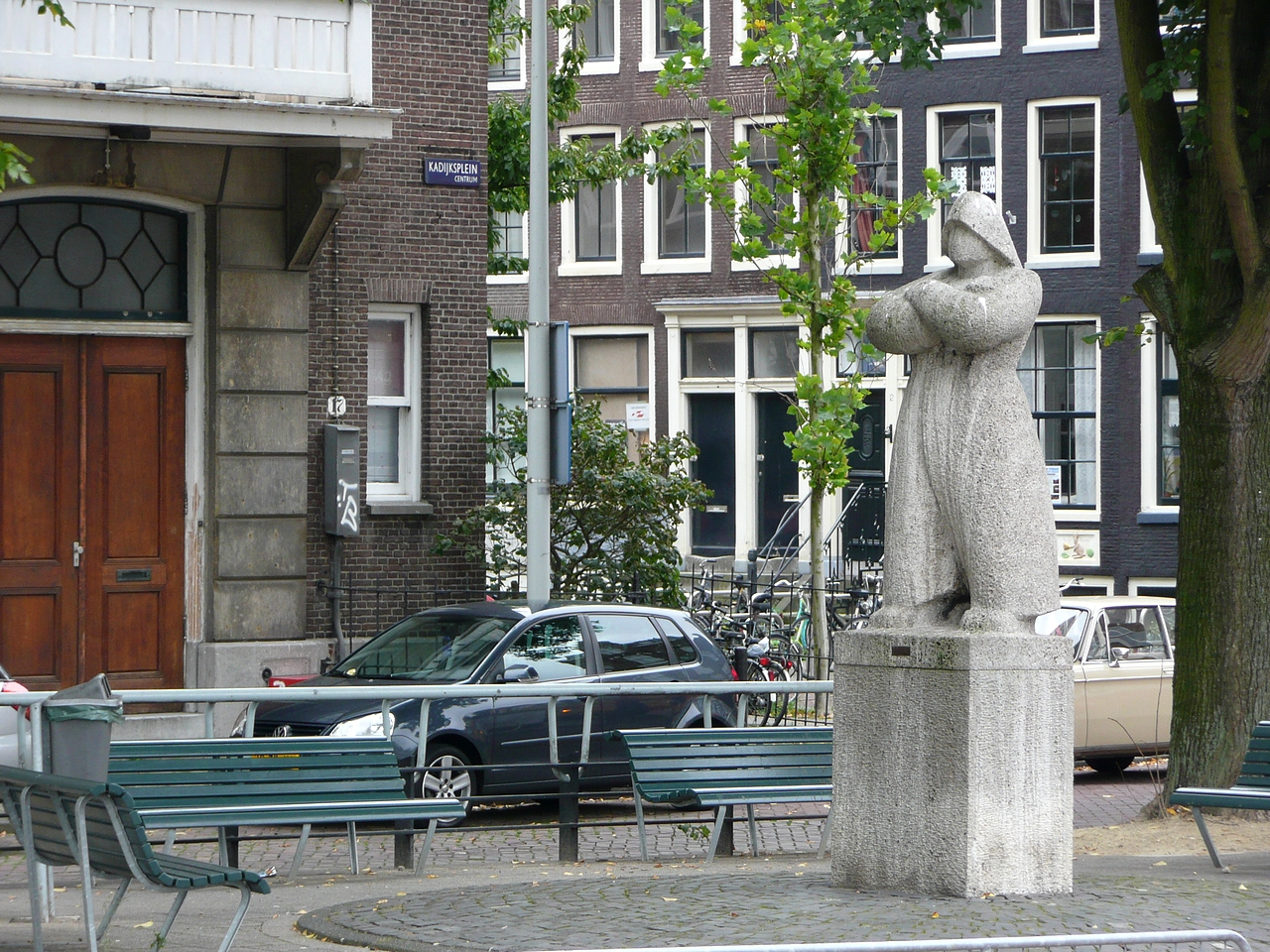 Sculpture Zeeman (1980) by Joost Barbiers, Kadijksplein in Amsterdam/The NetherlandsAmsterdam